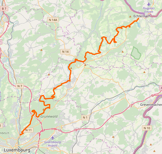 Tracé du Sentier pédestre national du Mëllerdall